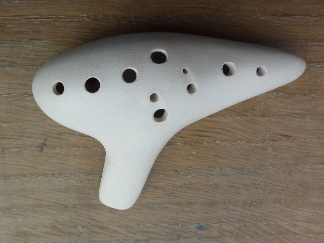 Ocarina monocamera a 12 fori in tonalità Alto C, range (da accordatore elettronico) A4--F6. Questo modello denominato "Slim type, tra quelli da me prodotti, è da considerarsi il capostipite di uno schema progettuale che tende a costituire il tratto d'unione tra l'ocarina orientale e quella legata alla tradizione italiana. Senza entrare nel merito dell'utilità di una monocamera con tale estenzione, si ribadisce che comunque tale schema NON va oltre i limiti fisici del sistema, se si rispettano dei parametri di progettazione piuttosto rigidi.